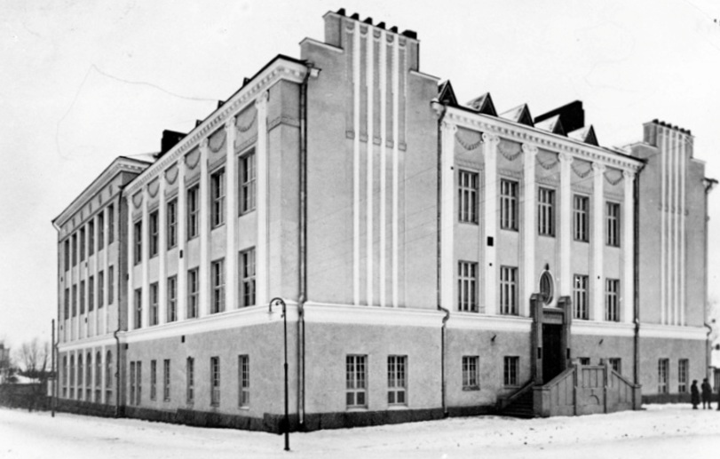 Выборгское новое совместное училище